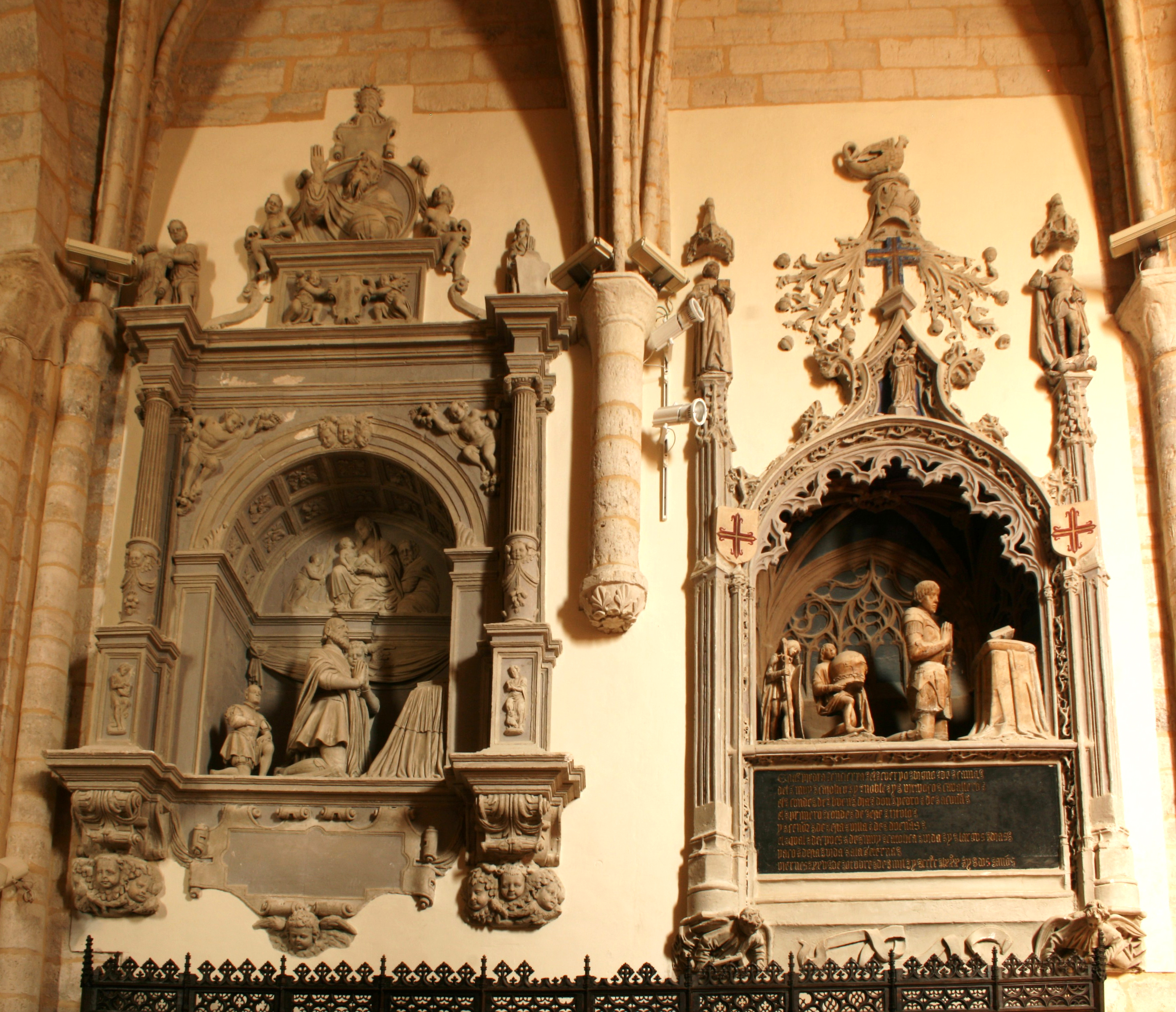 Sepulcros de Pedro Vázquez de Acuña, primer conde de Buendía, y de Fadrique de Acuña, quinto conde de Buendía, en la capilla mayor de la iglesia de Ntra. Sra. de la Asunción de Dueñas, provincia dePalencia, (España).